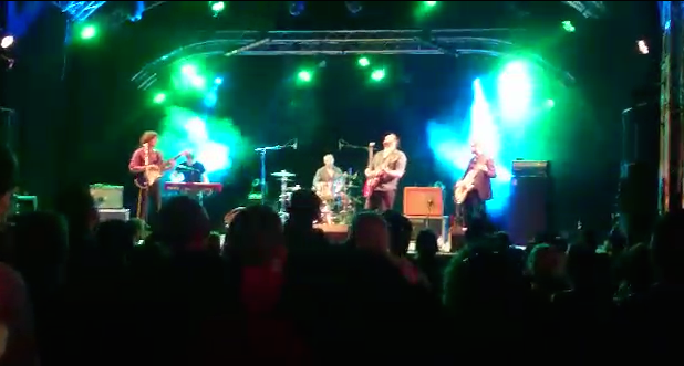 The Crags au Caribana Festival 2014